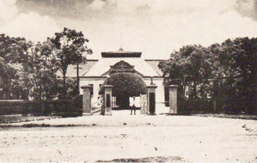 臺中地方法院，現址亦為台中地方法院